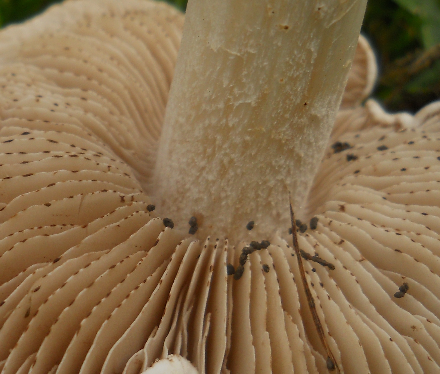 Hebeloma crustuliniforme (Bull.) Quél.